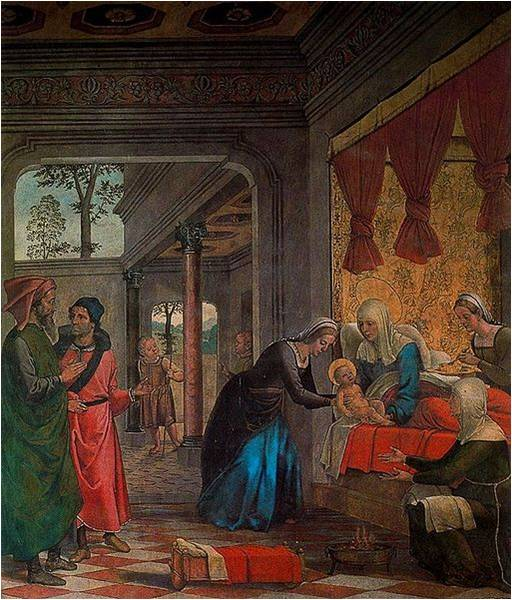 Llit